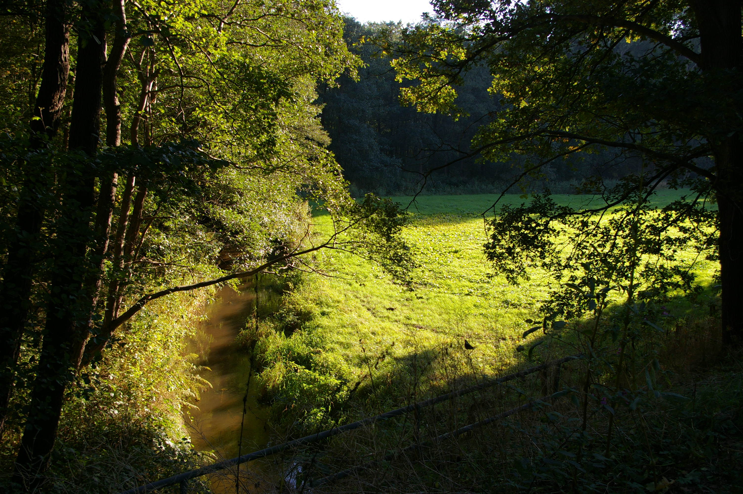 Das Hachetal bei Jardinghausen